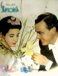 Tapa de la Revista Sintonía. Evita y Alberto Vila